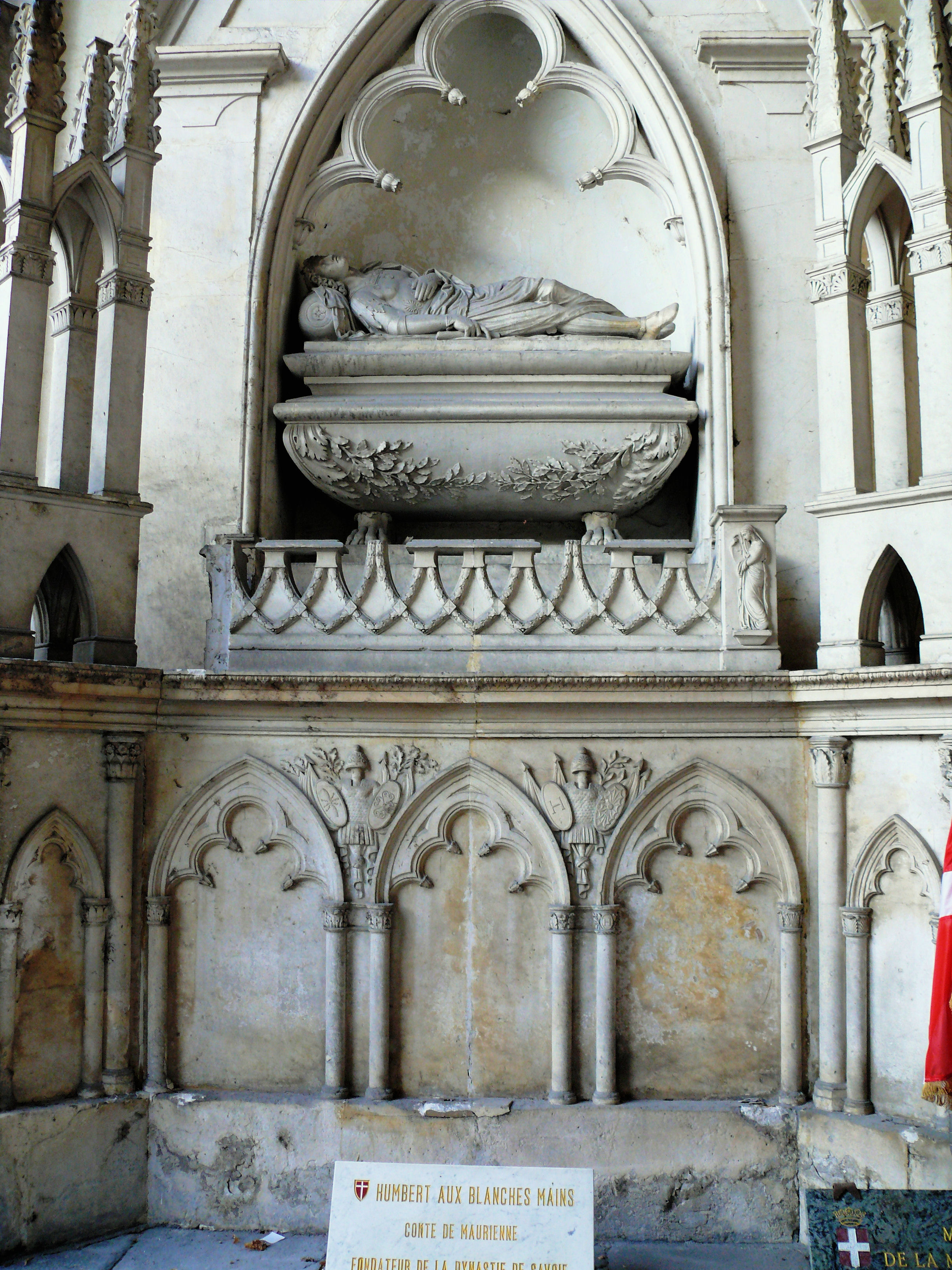 Cathédrale Saint-Jean-Baptiste de Saint-Jean-de-Maurienne - Porche - Cénotaphe de Humbert aux Blanches mains, premier comte de Maurienne et fondateur de la dynastie de Savoie